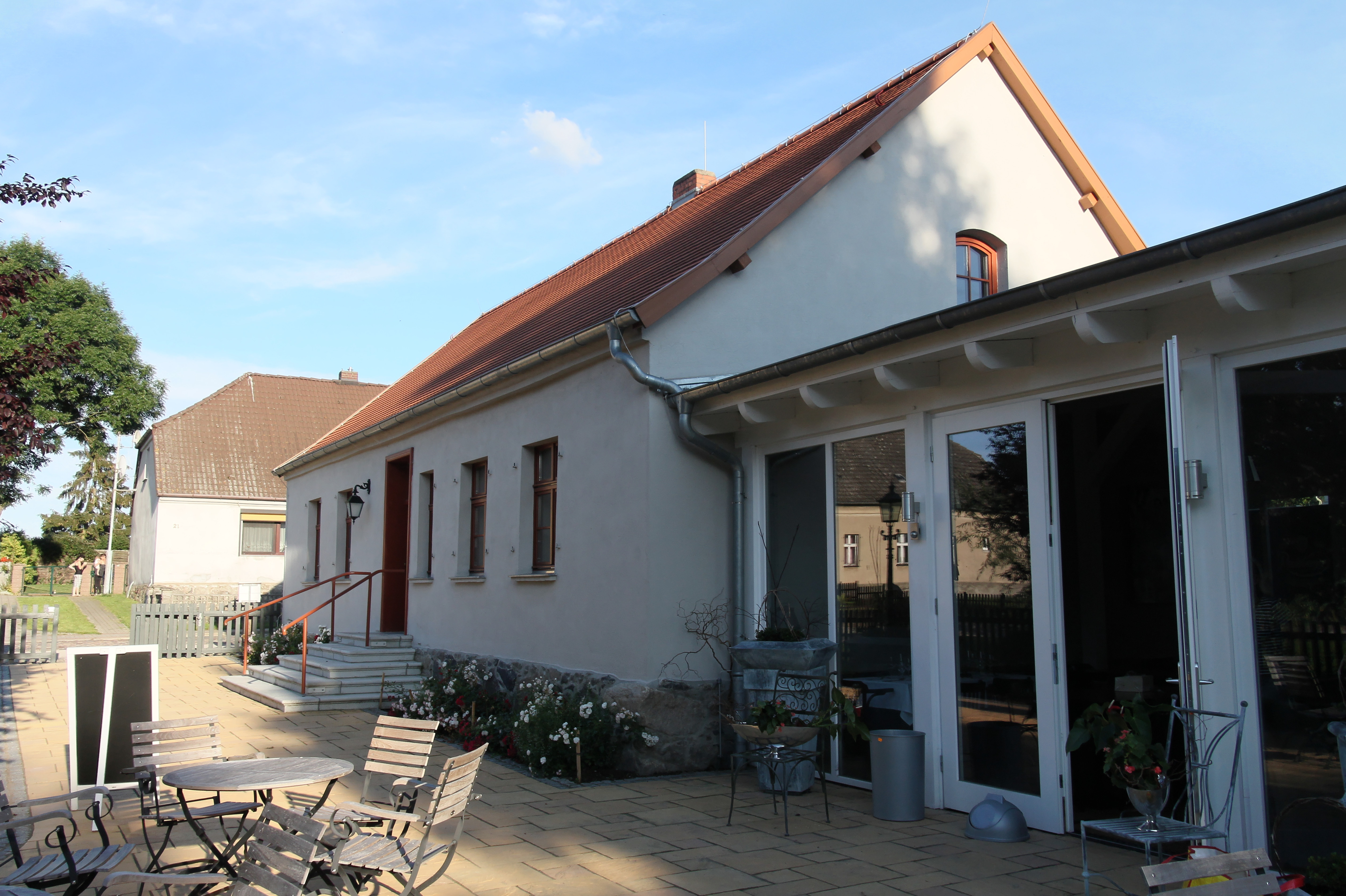 Damerow Gutsmuseum und Museumcafe im Küsterschulhaus This is a photograph of an architectural monument.